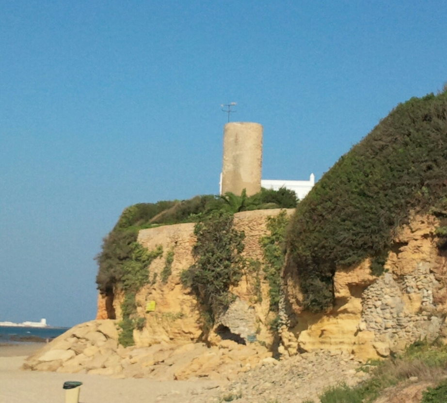 Torre Bermeja, playa de la barrosa, chiclana de la frontera